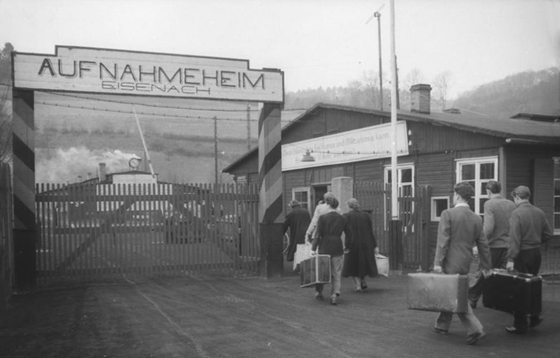 Zentralbild/Hesse 13.4.1956 Täglich neue Übersiedler aus Westdeutschland (Ein Besuch im Aufnahmelager Eisenach) Jugendliche, Ingenieure, Facharbeiter und Bauern sind unter den vielen Rückkehrern und Übersiedlern, die tagtäglich im Aufnahmelager Eisenach eintreffen. Die verschiedensten Gründe haben sie bewogen mit dem Bonner Staat zu brechen. Mangelnde Berufsaussichten und die drohende Zwangsrekrutierung sind mit die Ursache, warum vor allem Jugendliche diesen Weg wählen. Angehörige der Intelliganz geben an, dass sie sich nicht in die westdeutsche Kriegsproduktion einspannen lassen wollen. Verschärfte Ausbeutung, soziale Notlage und politische Bedrängnis sind weitere Gründe dafür in der DDR ein neues Leben zu beginnen. Im Aufnahmelager finden Aussprachen ber den künftigen Arbeitsplatz und den neuen Heimatbezirk der Übersiedler statt. Vorbildliche Betreuung während des Lageraufenthaltes sorgt dafür, dass von diesen Bürgern der Alpdruck der Vergangenheit genommen wird. (Näheres siehe ADN-Meldung vom 12.4.1956) UBz.: Neuzugänge, Bürger, die dem "goldenen Westen" den Rücken gekehrt haben, treffen ein.